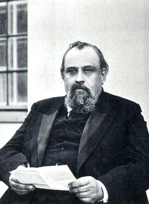 Ковалевский, Максим Максимович